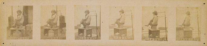 Série de photos d'une fillette prise par François Willème pour réaliser une photosculpture en 1865.